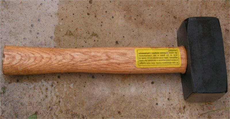 Młotek kamieniarski, autor zdjęcia: Puchatech K. (2005)